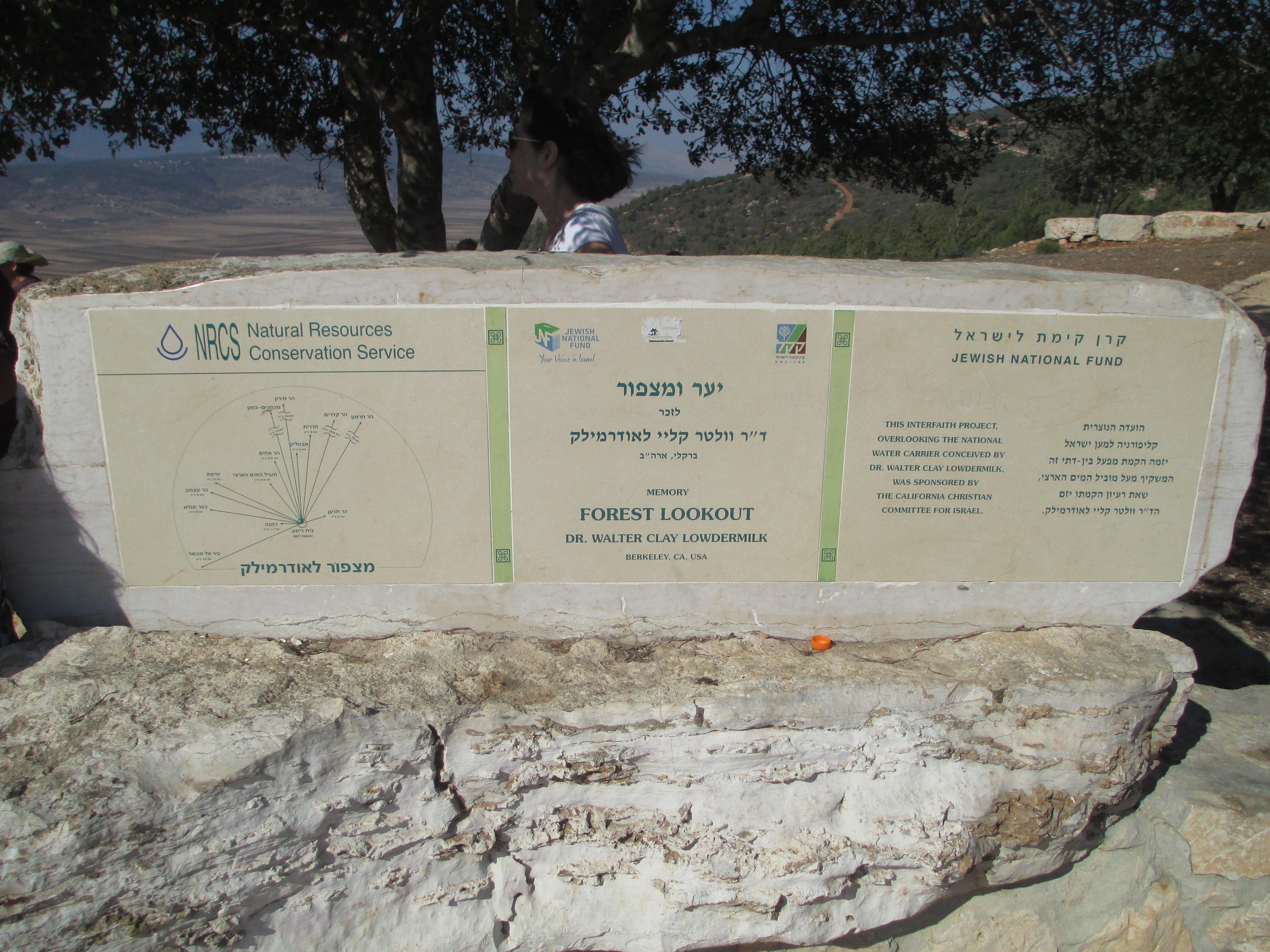 מצפור ע"ש ולטר קליי לאודרמילק בגליל התחתון מעל בקעת בית נטופה